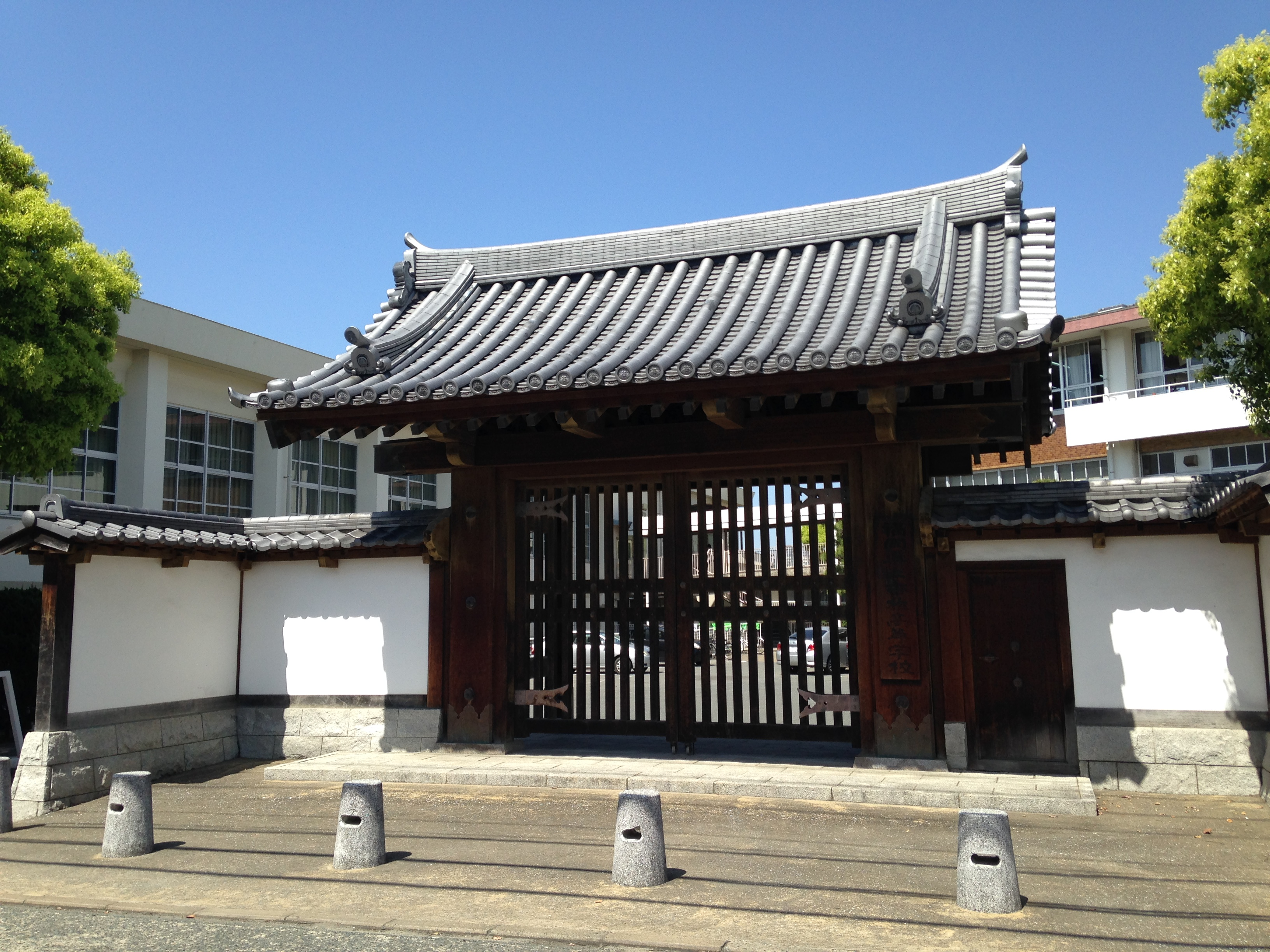 福岡県立香椎高等学校の正門(黒門)